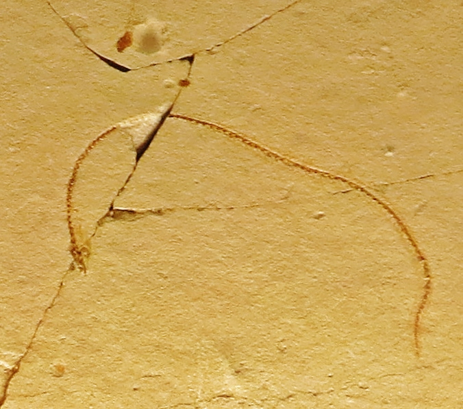 Fossil - Took the picture at Museo di storia naturale di Verona